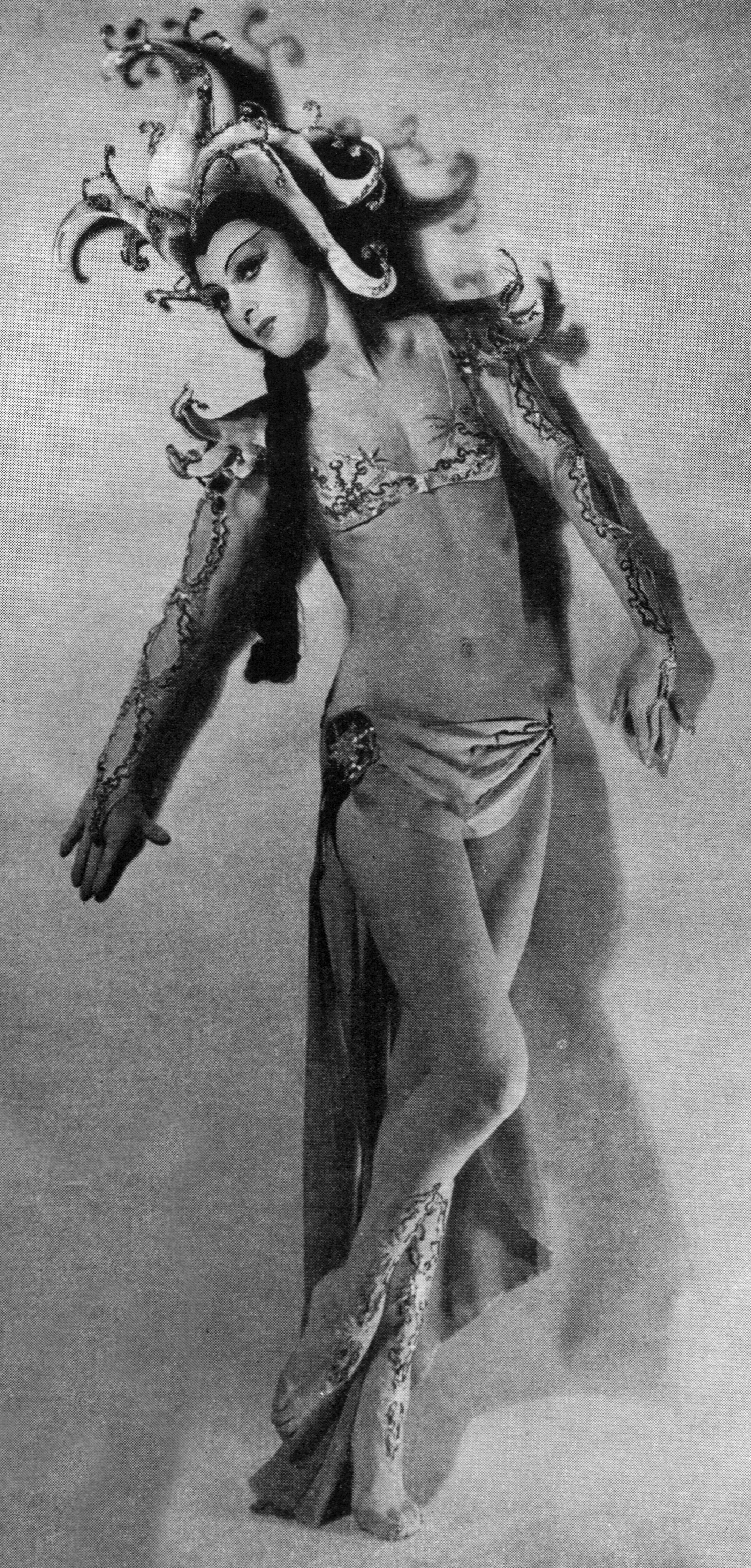 Balettdansören Brita Appelgren i Thais